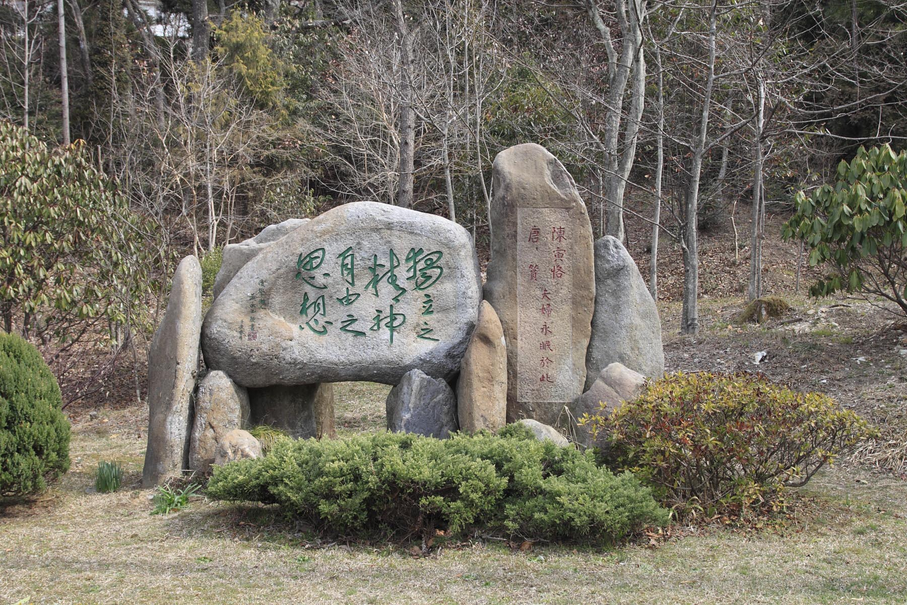 位于庐山植物园内的陈寅恪墓，庐山风景名胜区文物保护单位